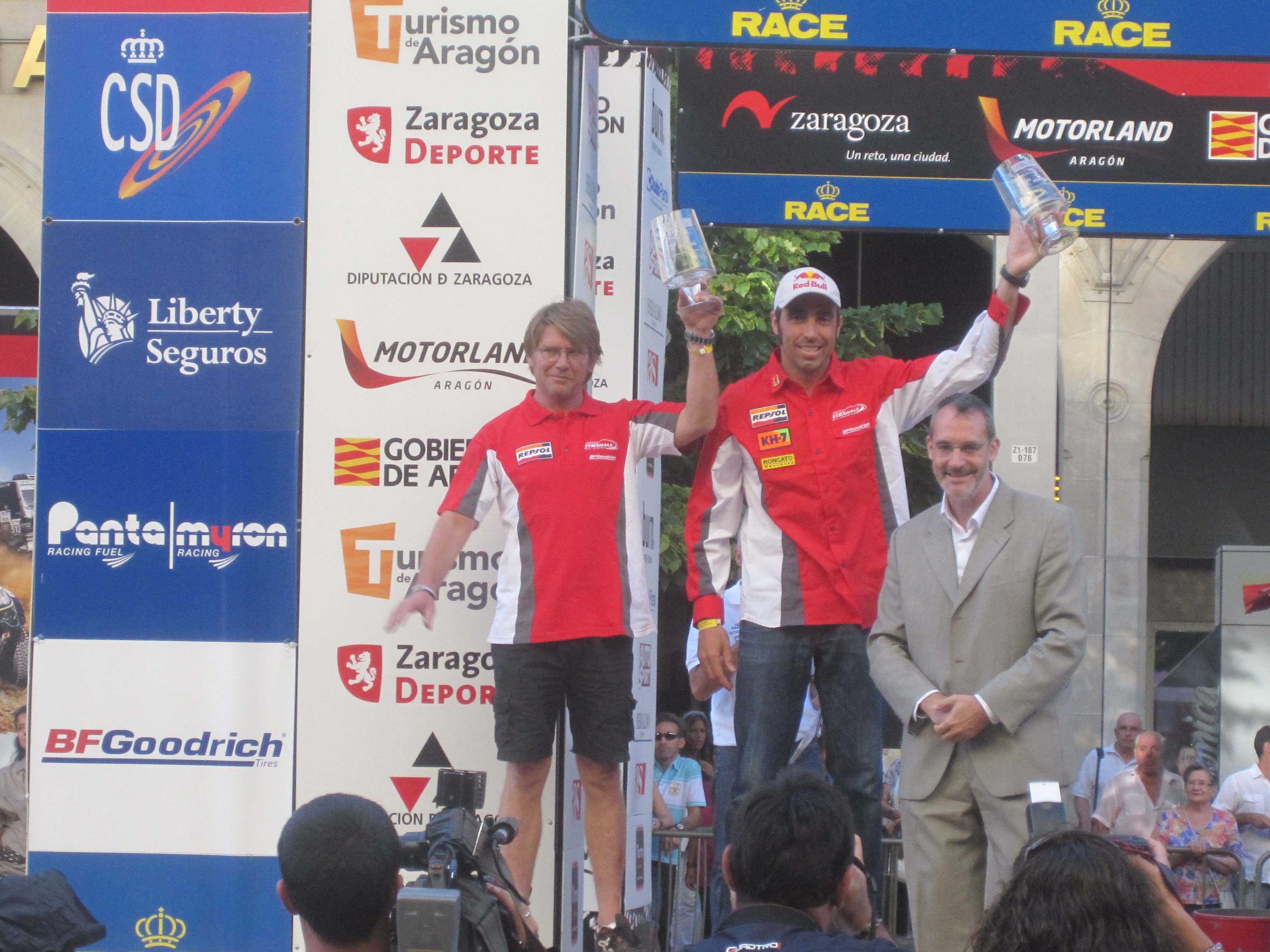 El piloto español Nani Roma en Zaragoza en 2010.